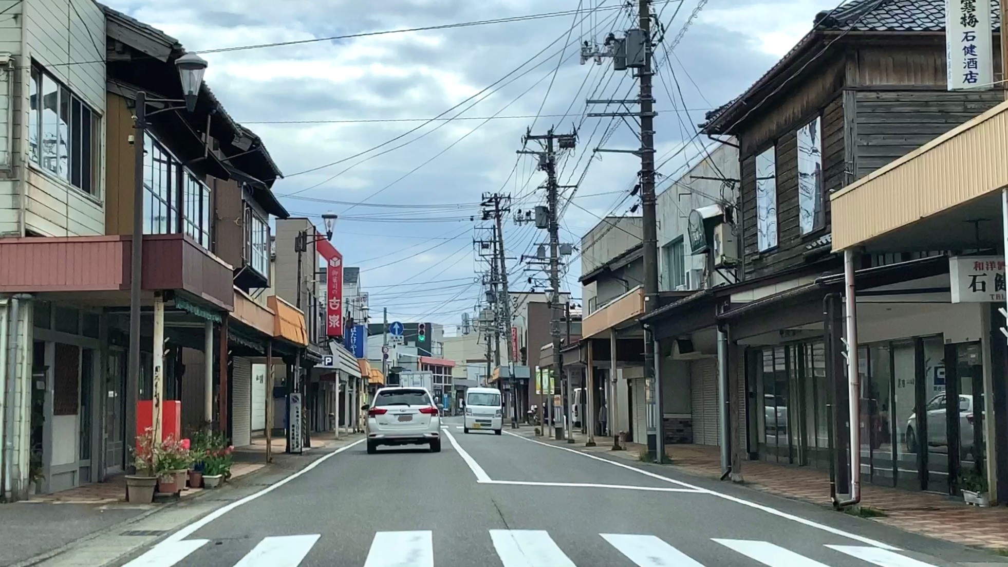 新潟県道5号新潟新津線 亀田本町（2020年4月）